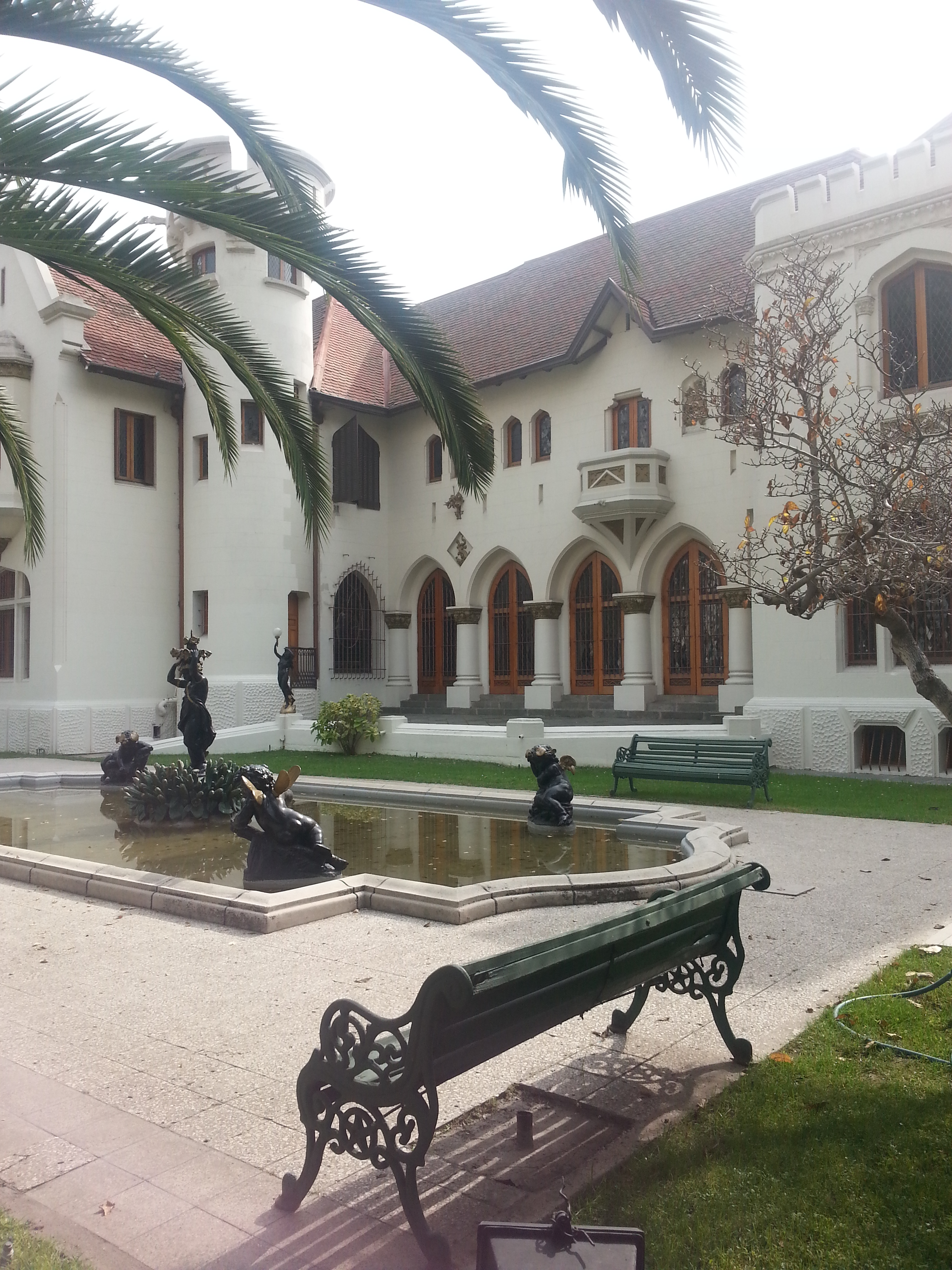 Vista del jardín exterior y pileta del palacio Ortúzar en Ñuñoa, Santiago de Chile